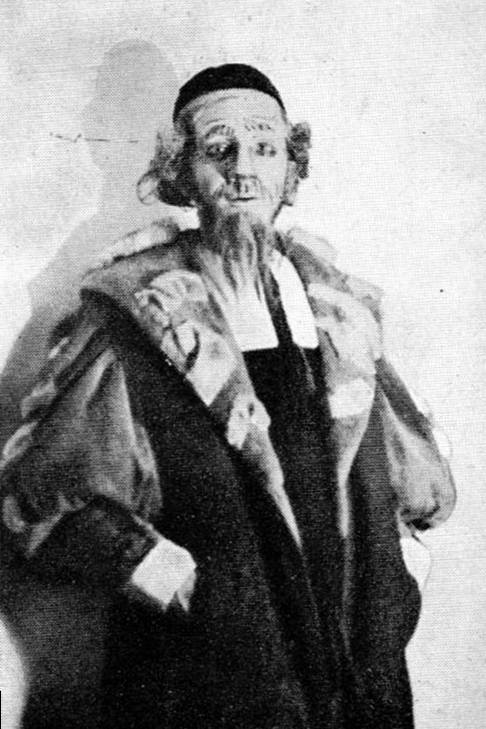 מנחם גנסין, סוף שנות ה-30.